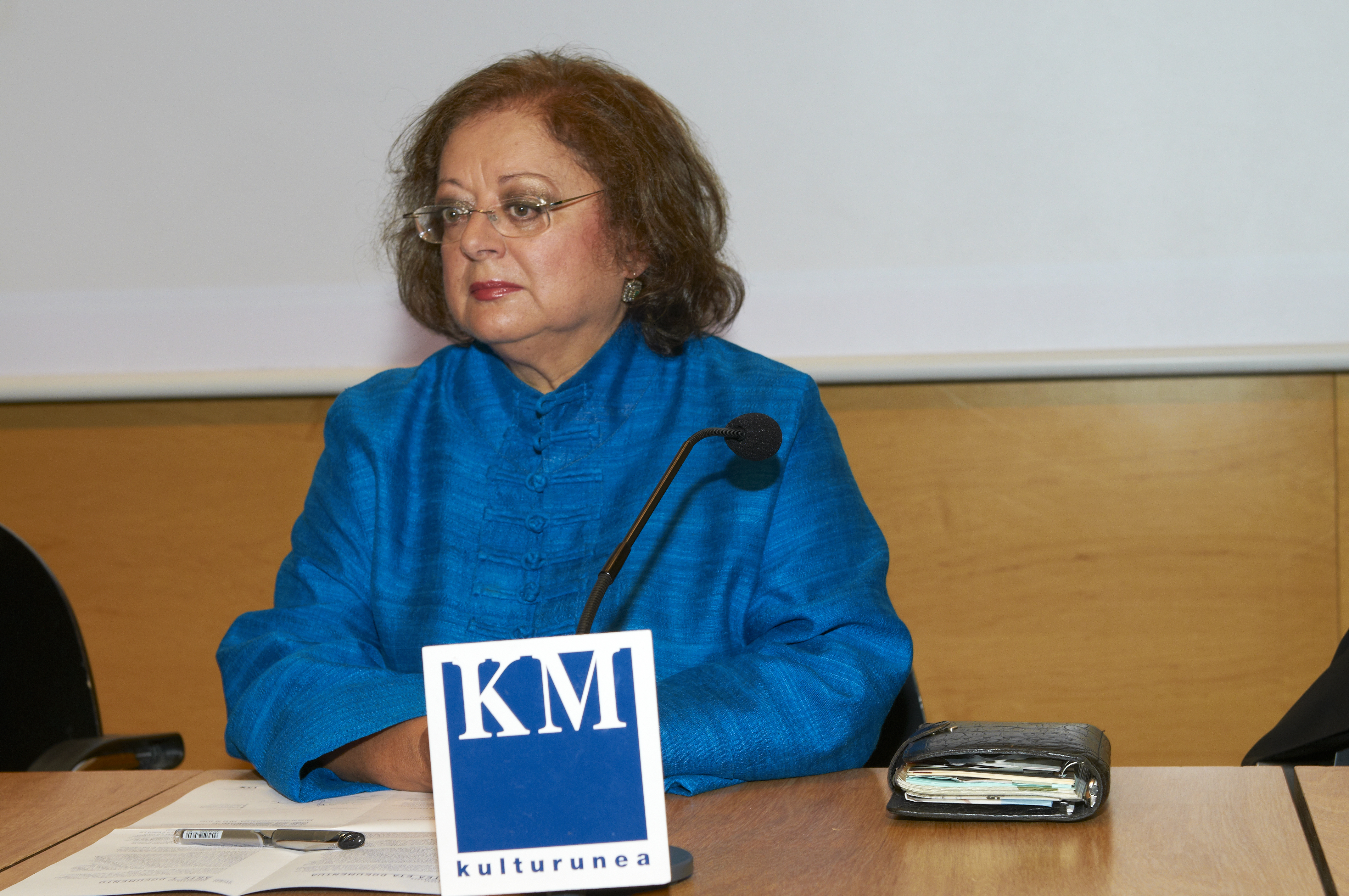 fotografía de Cristina García Rodero, realizada por Ricardo Iriarte, en un acto celebrado en KOLDO MITXELENA Kulturunea, Donostia-San Sebastián